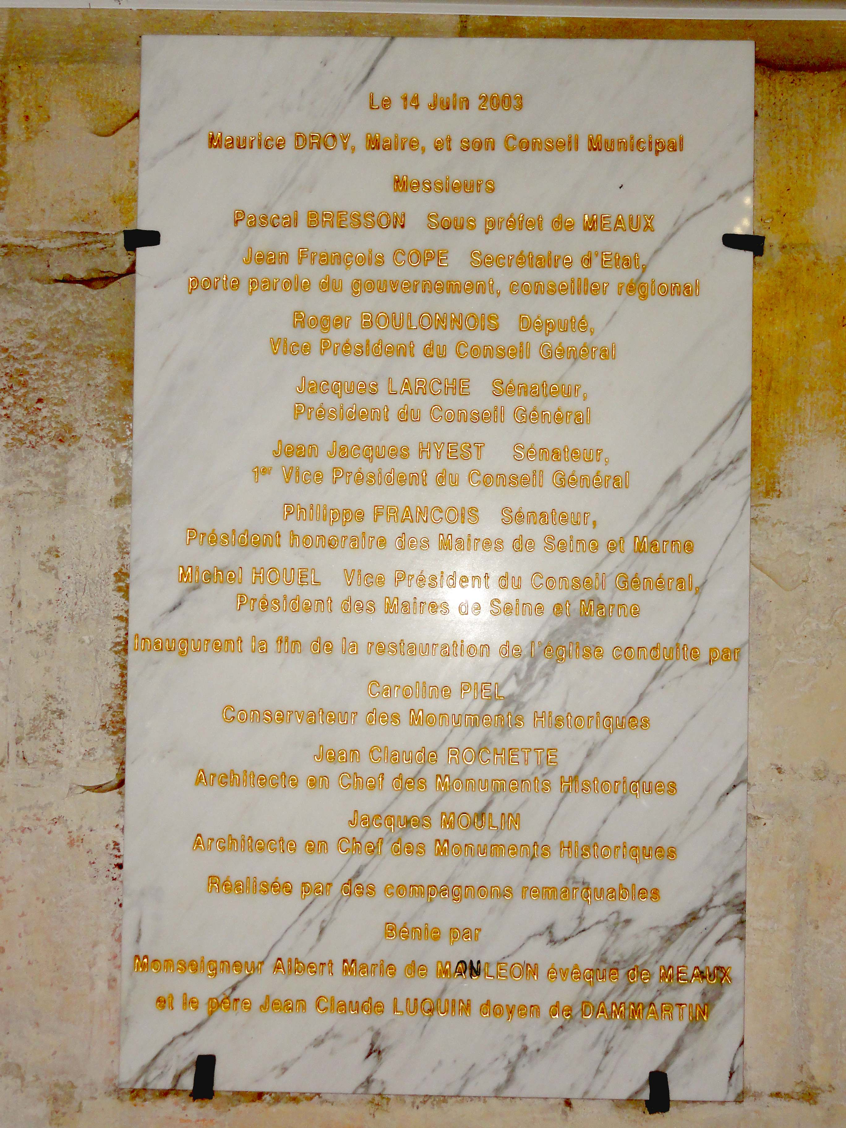 Mobilier de l'église - voir titre.